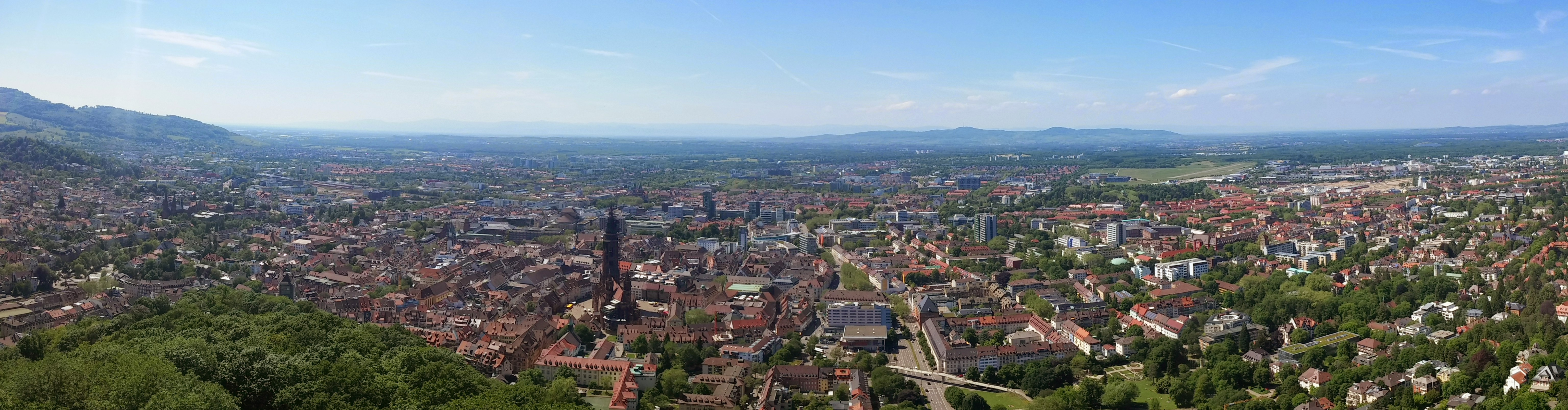 Panorama av Freiburg